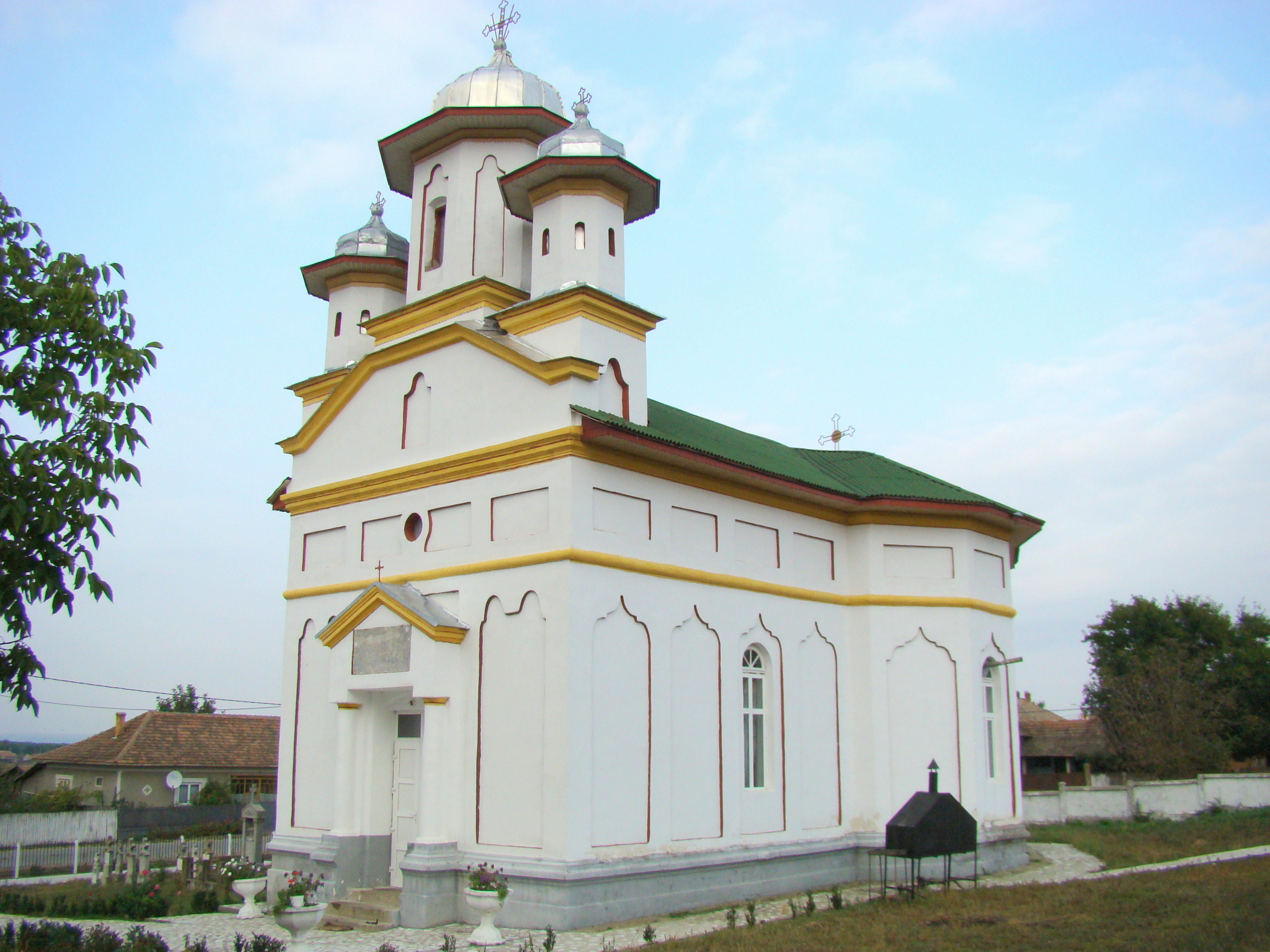 Biserica monument „Sf.Nicolae” din Pătulele, județul Mehedinți